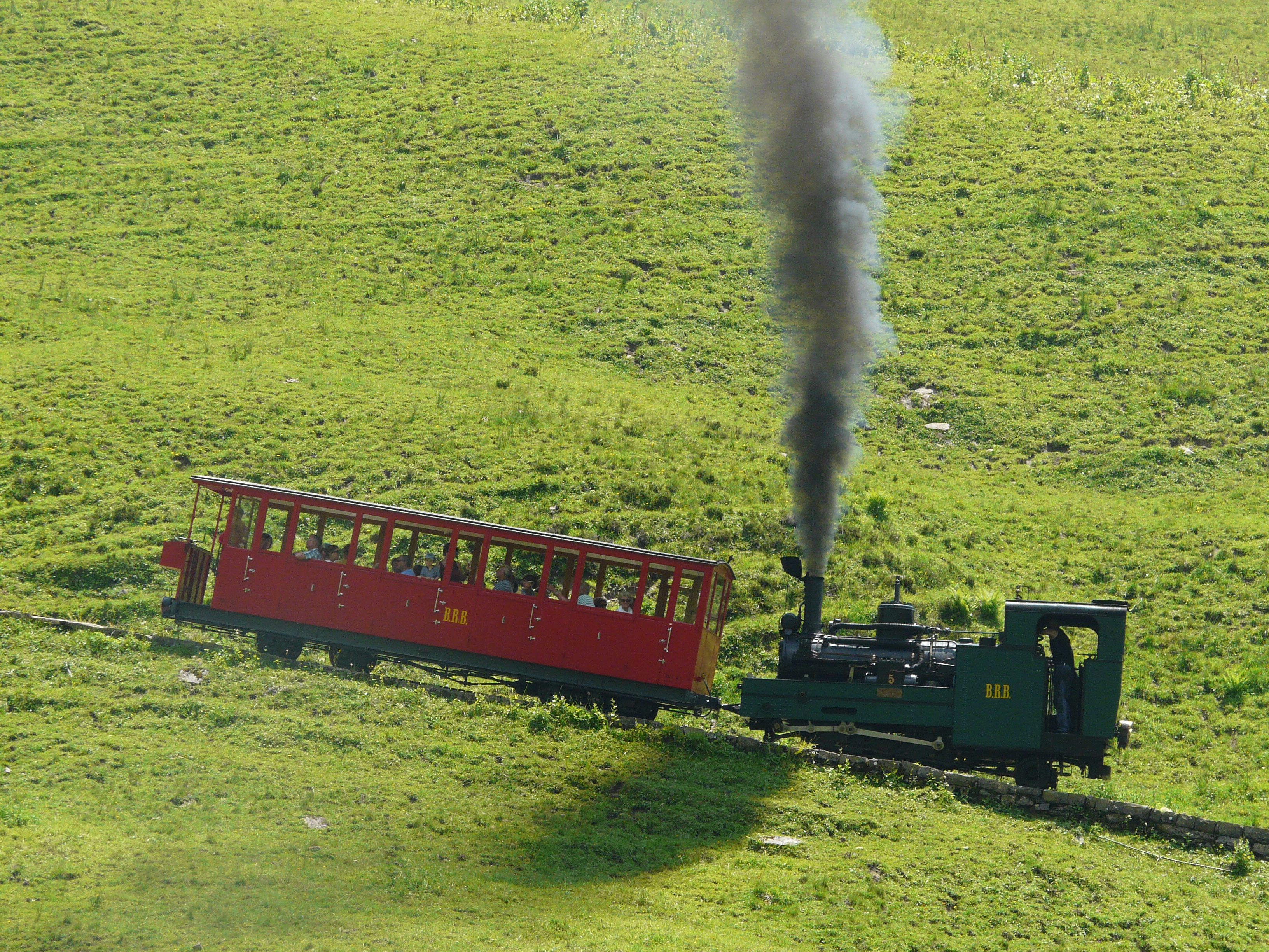 Dampfzug der Brienzer Rothornbahn